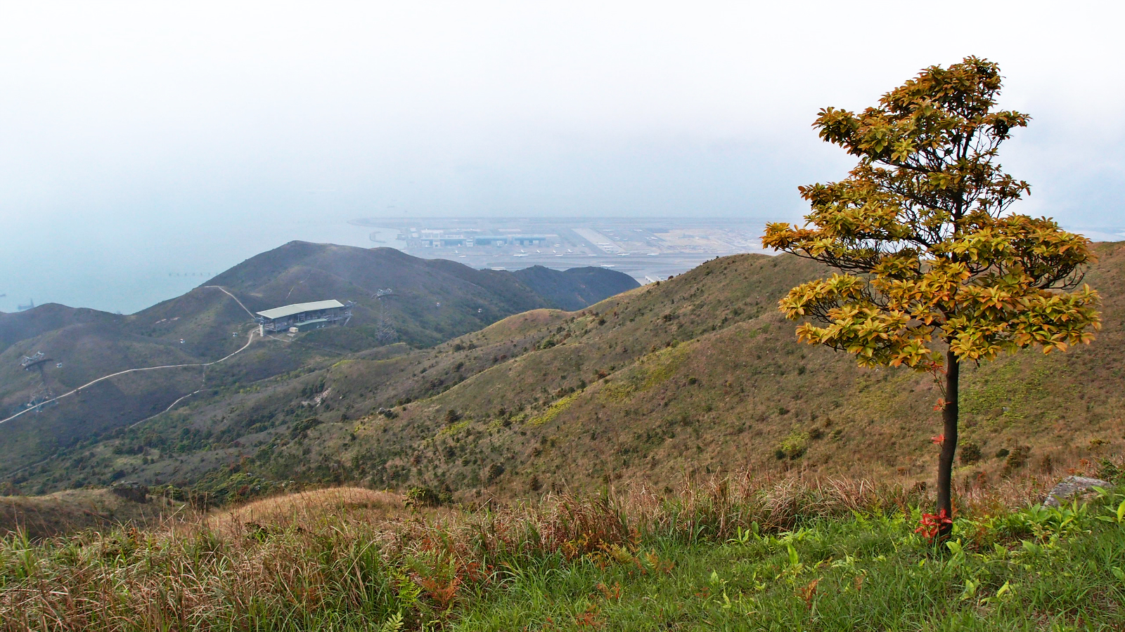 粵語: 彌勒山北脊，可望見纜車